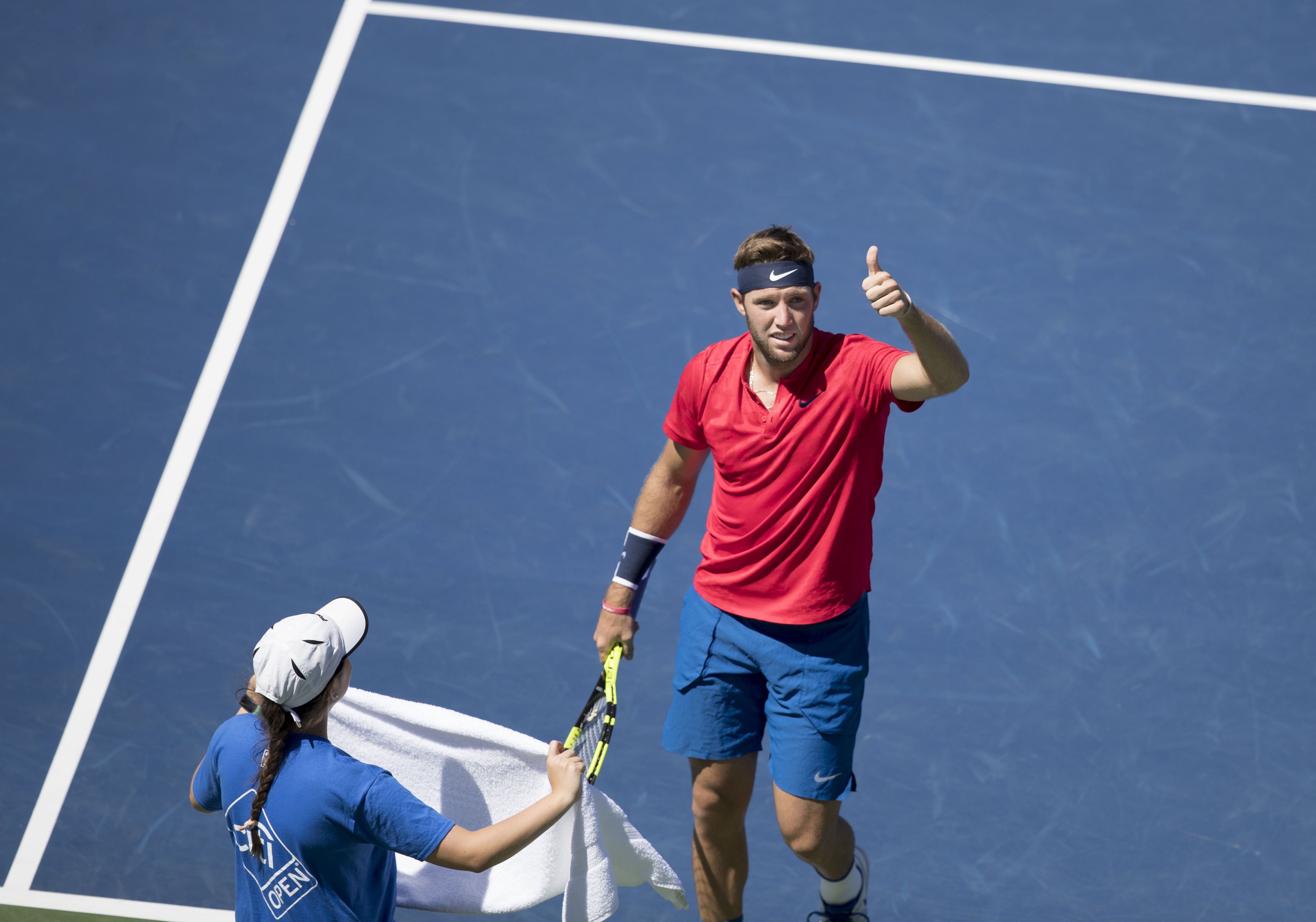 Citi Open Tennis 2017